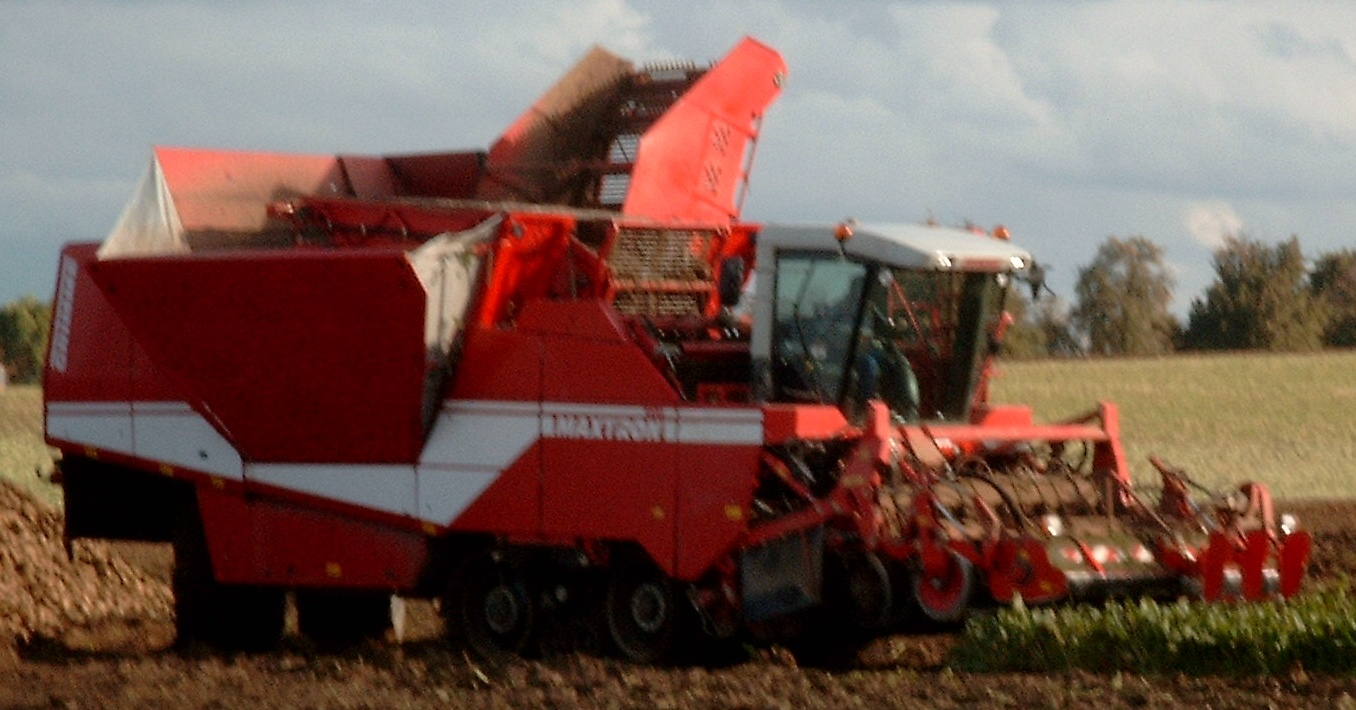 Grimme-Rübenroder Maxtron mit Raupenlaufwerk